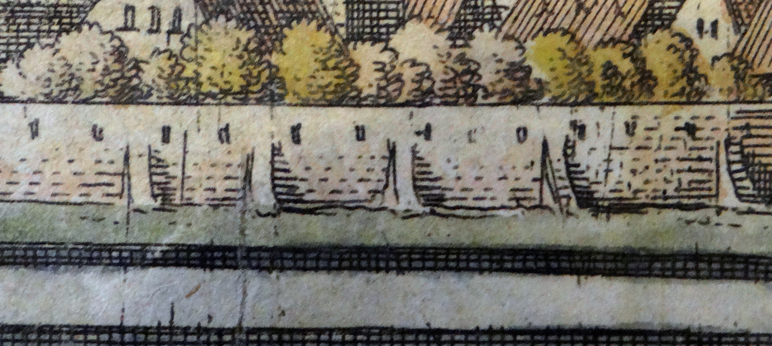 Abschnitt der äußeren Stadtmauer, Worms. Detail aus: Matthäus Merian: Topographia Palatinus Rheni et Vicinarum Regionum. Hoffmann, Frankfurt 1645, Tafel zwischen S. 96 u. 97. Stadtarchiv Worms: Abt. 217 Nr. 1495.